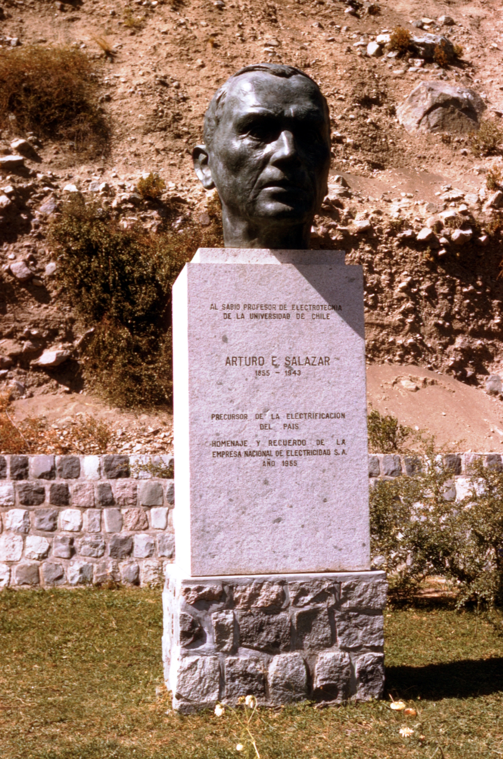 Busto de Arturo Salazar inaugurado en 1955 en la Central Hidroeléctrica de Cipreses, cerca de Talca, Chile